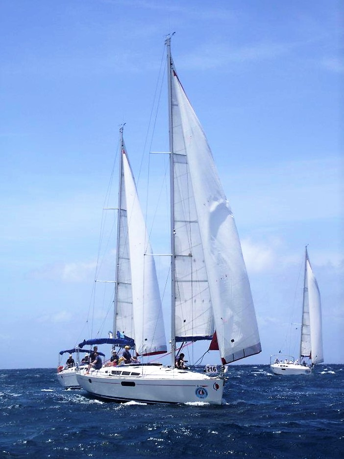 Esta imagen la tome en el evento de sailing week en Antigua en el 2012. Yo vivo en Antigua y Barbuda desde hace 8 anos.